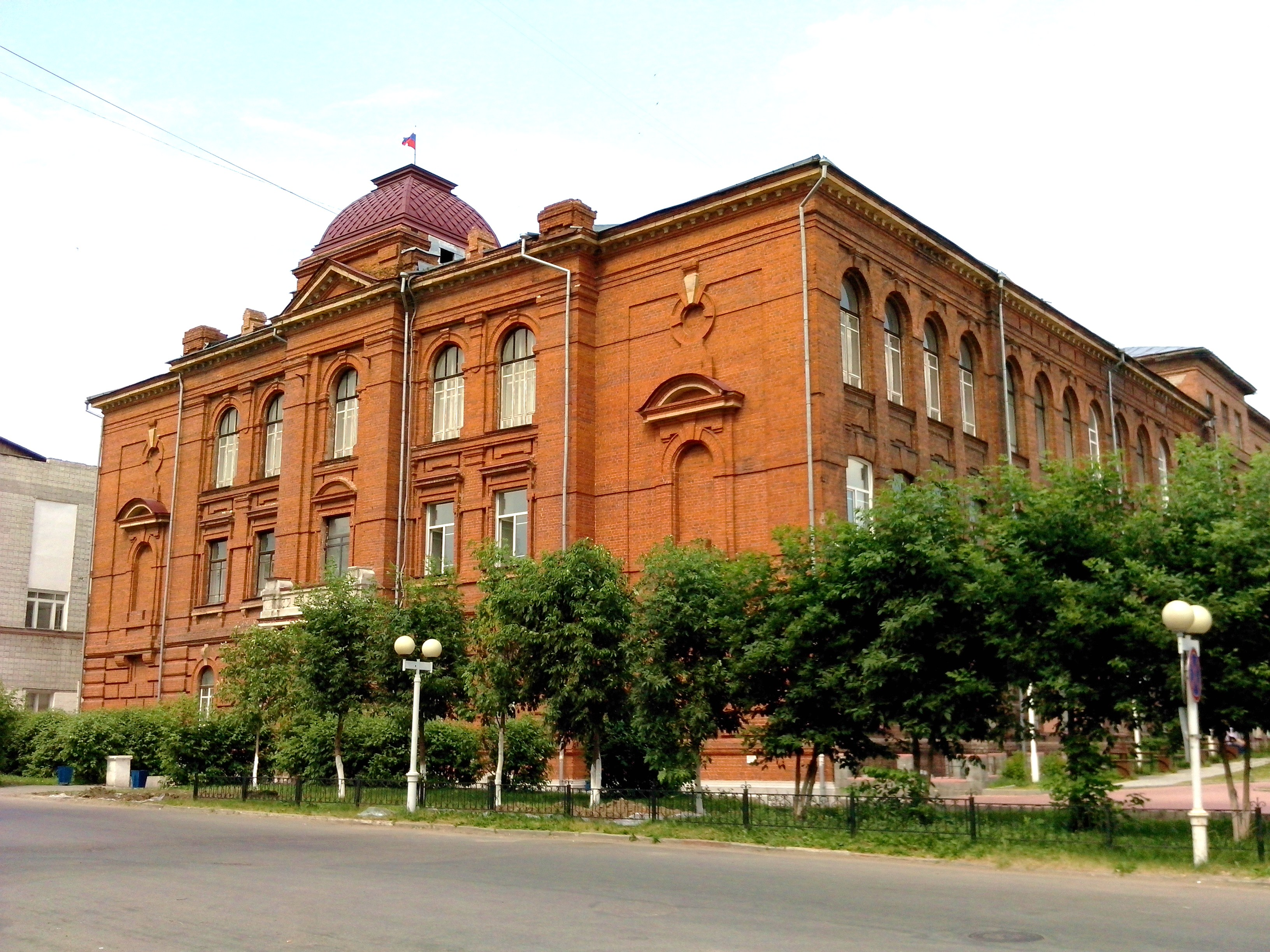 Первое Сибирское Коммерческое училище имени цесаревича Алексея, построено в 1904 году. Архитектор К.К. Лыгин. Ныне здание 2-го учебного корпуса Архитектурно-строительного университета.